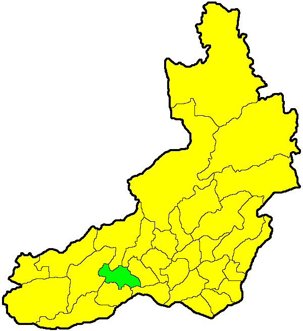 Дульдургинский район на карте Забайкальского края